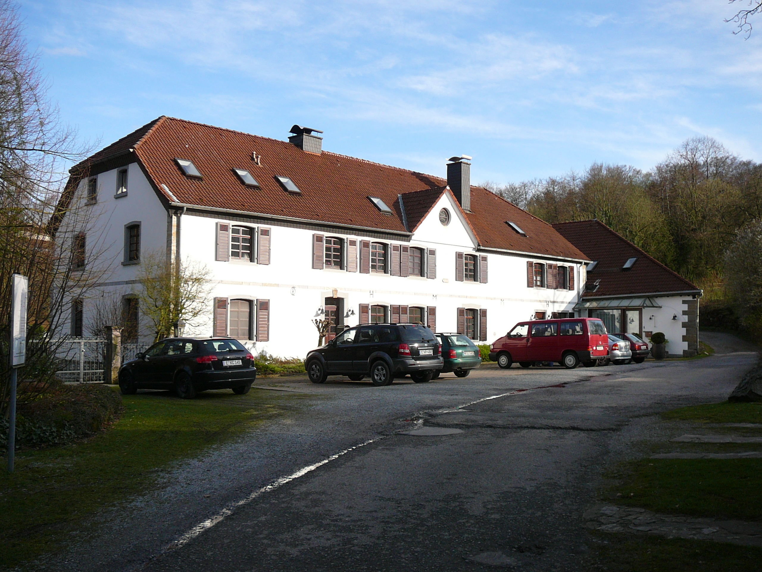 Gut Steinberg, Wuppertal/Katernberg-Uellendahl